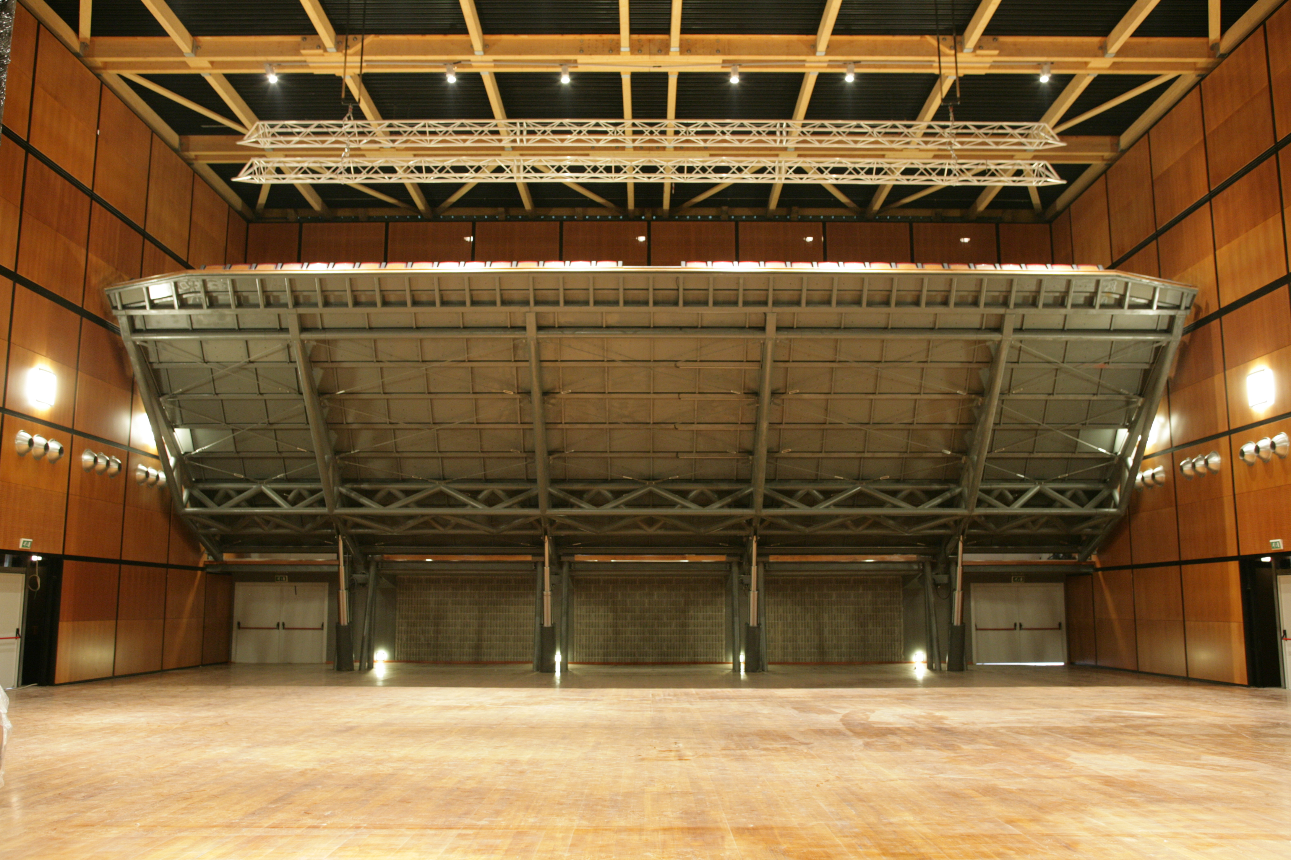 Gradonata in salita